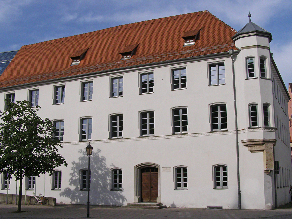 Unterhospital Memmingen - ehemaliges Amtshaus am Hallhof